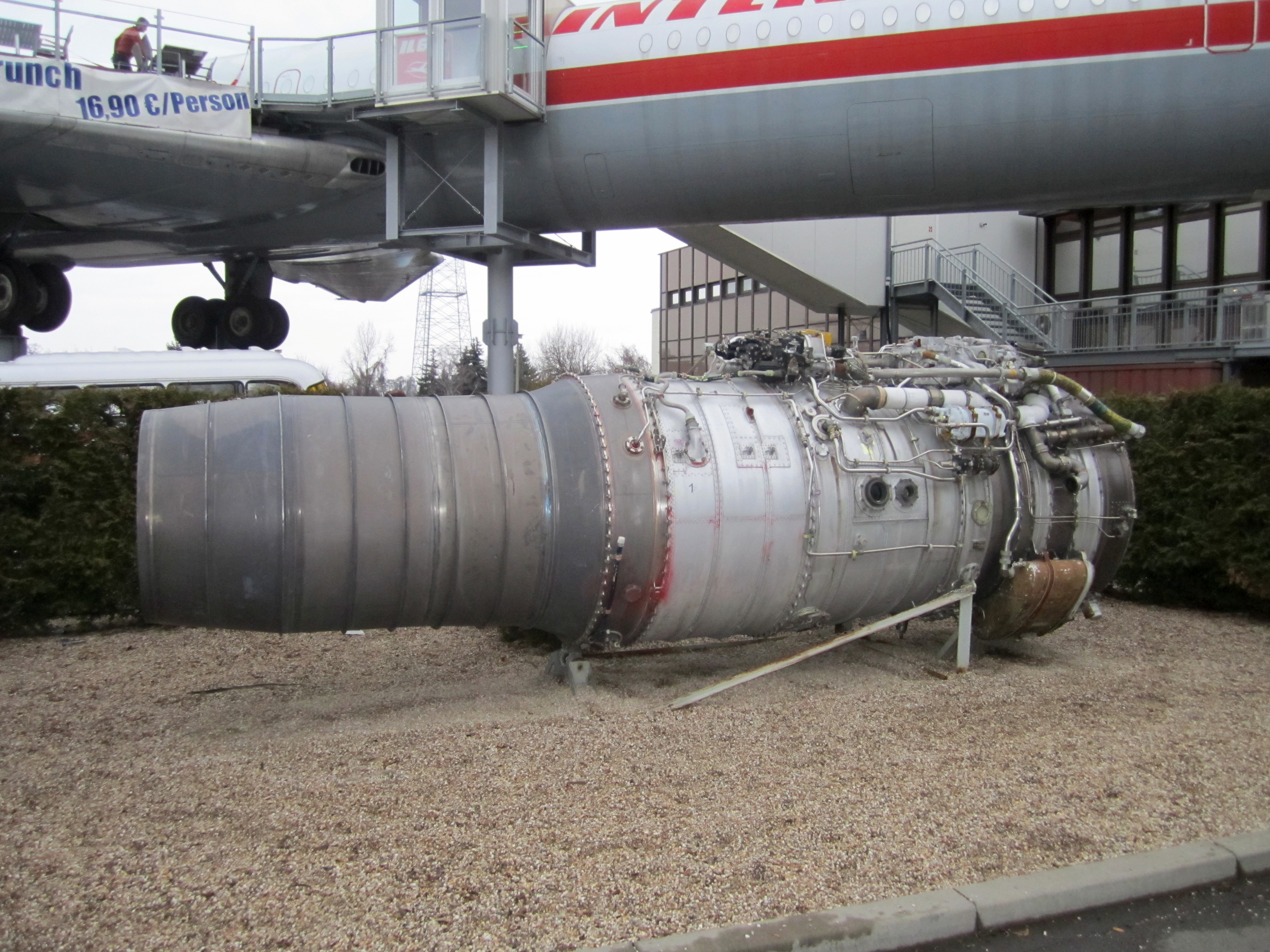 Kusnezow NK-8-4-Triebwerk der Il-62 DDR-SEF. Nutzung als Restaurant. Leipzig, Sachsen, Deutschland.